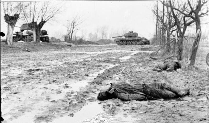 Scherl: Unmittelbar vor der Stellung vernichtet. Im Schutze starten Nebels gelangten Sowjetpanzer bis dicht vor die Stellung einer schweren Flakbatterie. Aber selbst auf die kurze Entfernung von nur 50 Metern hatten sie nichts gewonnen. Sie wurden durch Volltreffer der Flak erledigt, zwei weitere fielen Panzerfäusten zum Opfer, der Rest drehte ab. PK-Kriegsberichter Ellerbrock 28.2.1945 RPK III/280 Zentralbild 28.2.1945 Weltkrieg 1939-1945 An der Front in Südpommern am 20.2.1945. Nach einem Gefecht mit sowjetischen Panzern T 34.